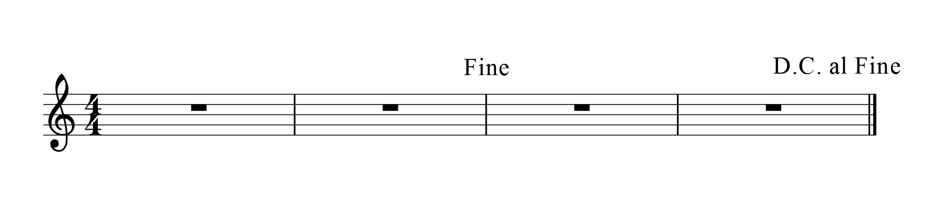 Hecho con MuseScore